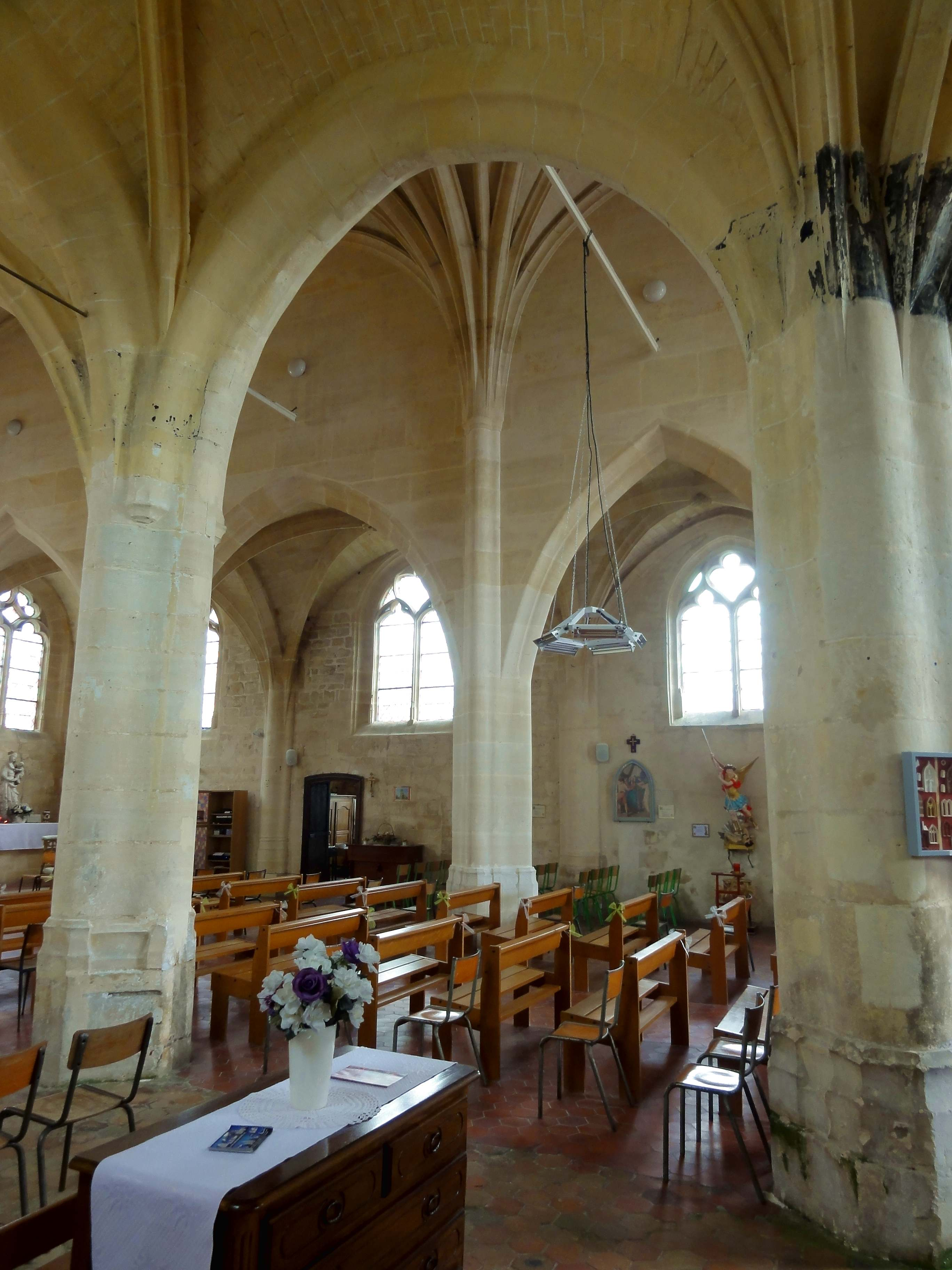 Intérieur de l'église - voir titre.